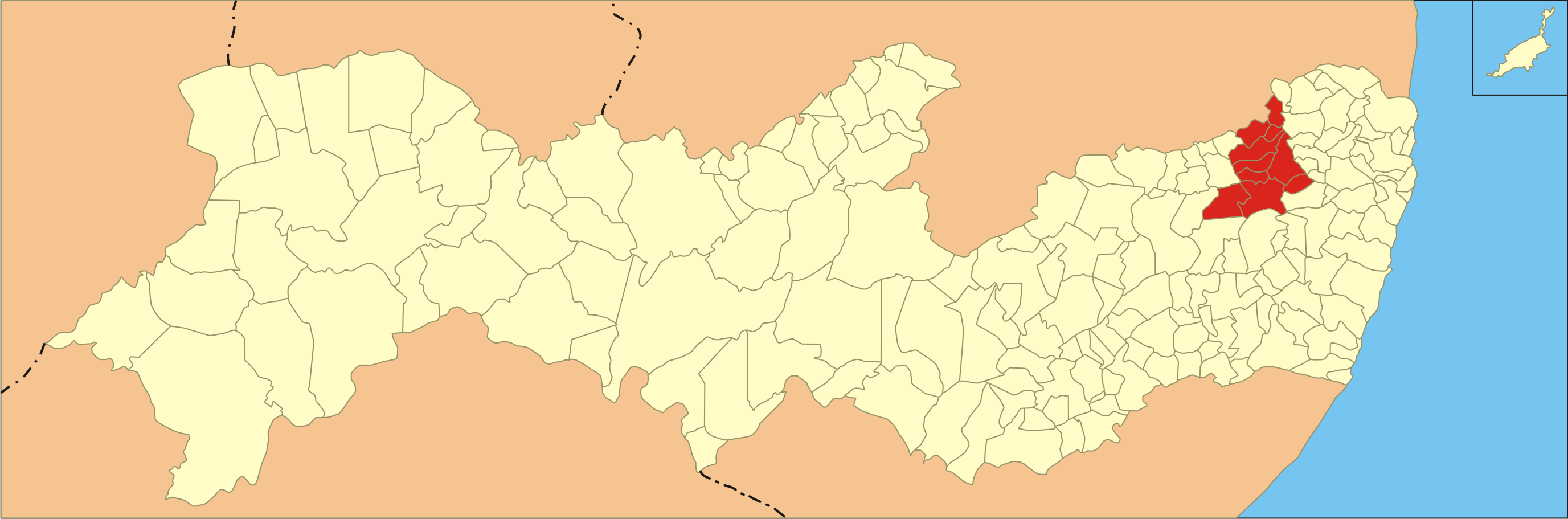 Localização da microrregião no estado de Pernambuco.